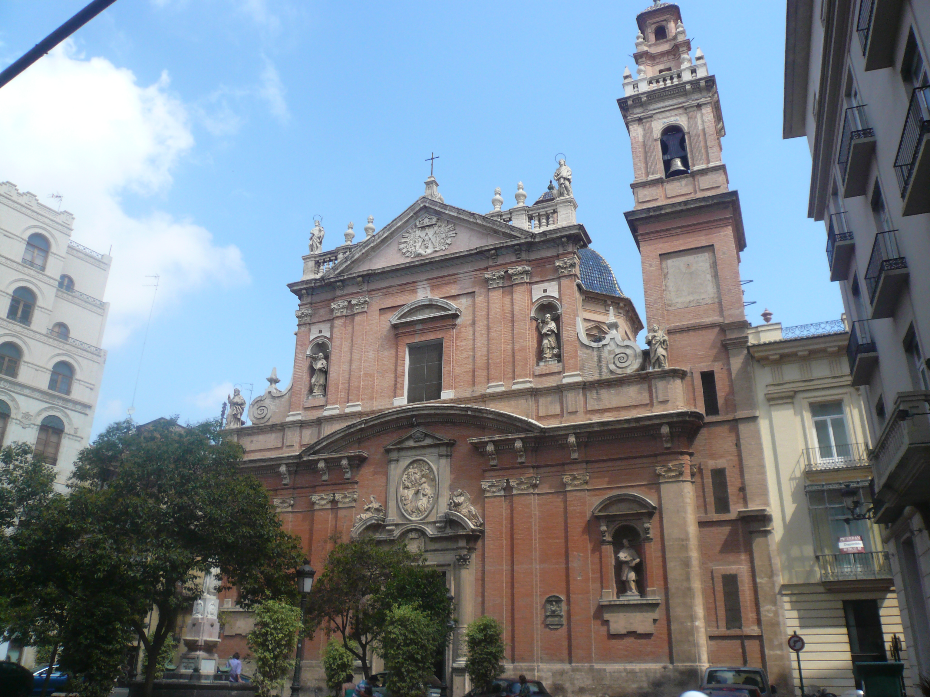 Església Parroquial de Sant Tomàs i Sant Felip Neri (València) Object location39° 28′ 26.6″ N, 0° 22′ 20.77″ W